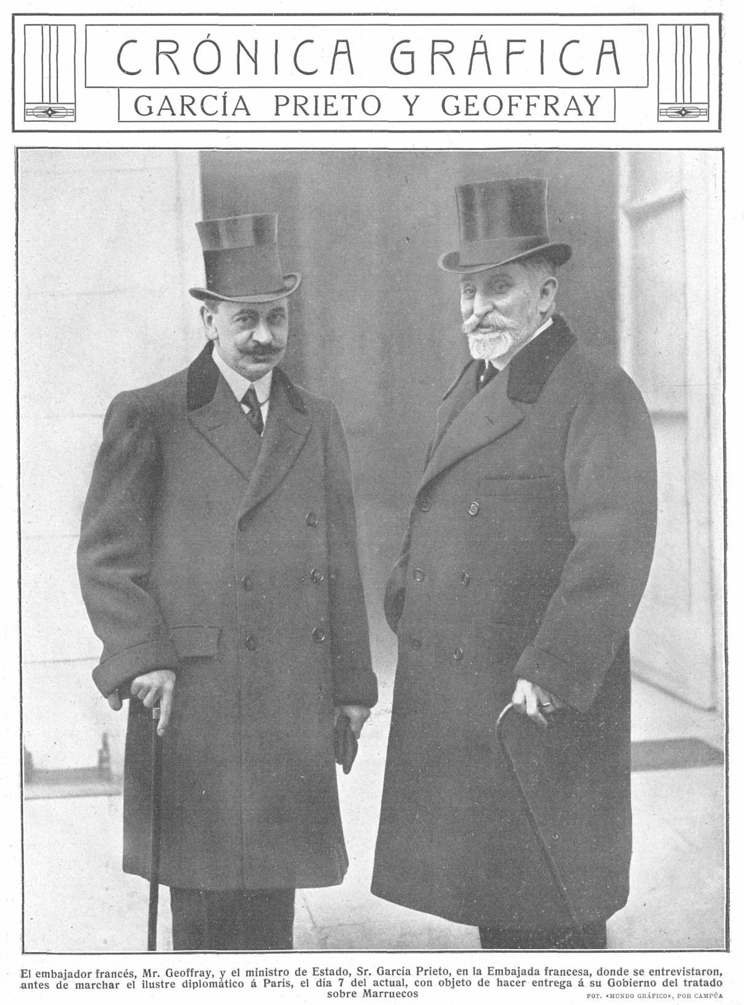 García Prieto y Geoffray.